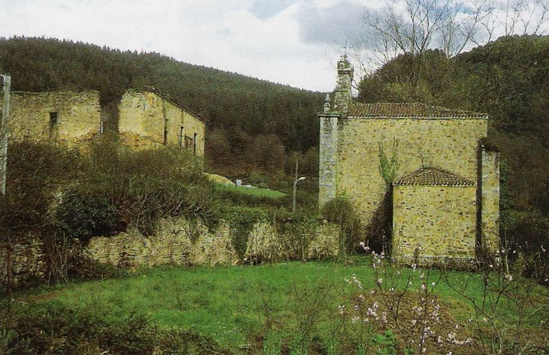 La ermita de San Antonio de la Mella, y a su lado el Palacio de Urrutia